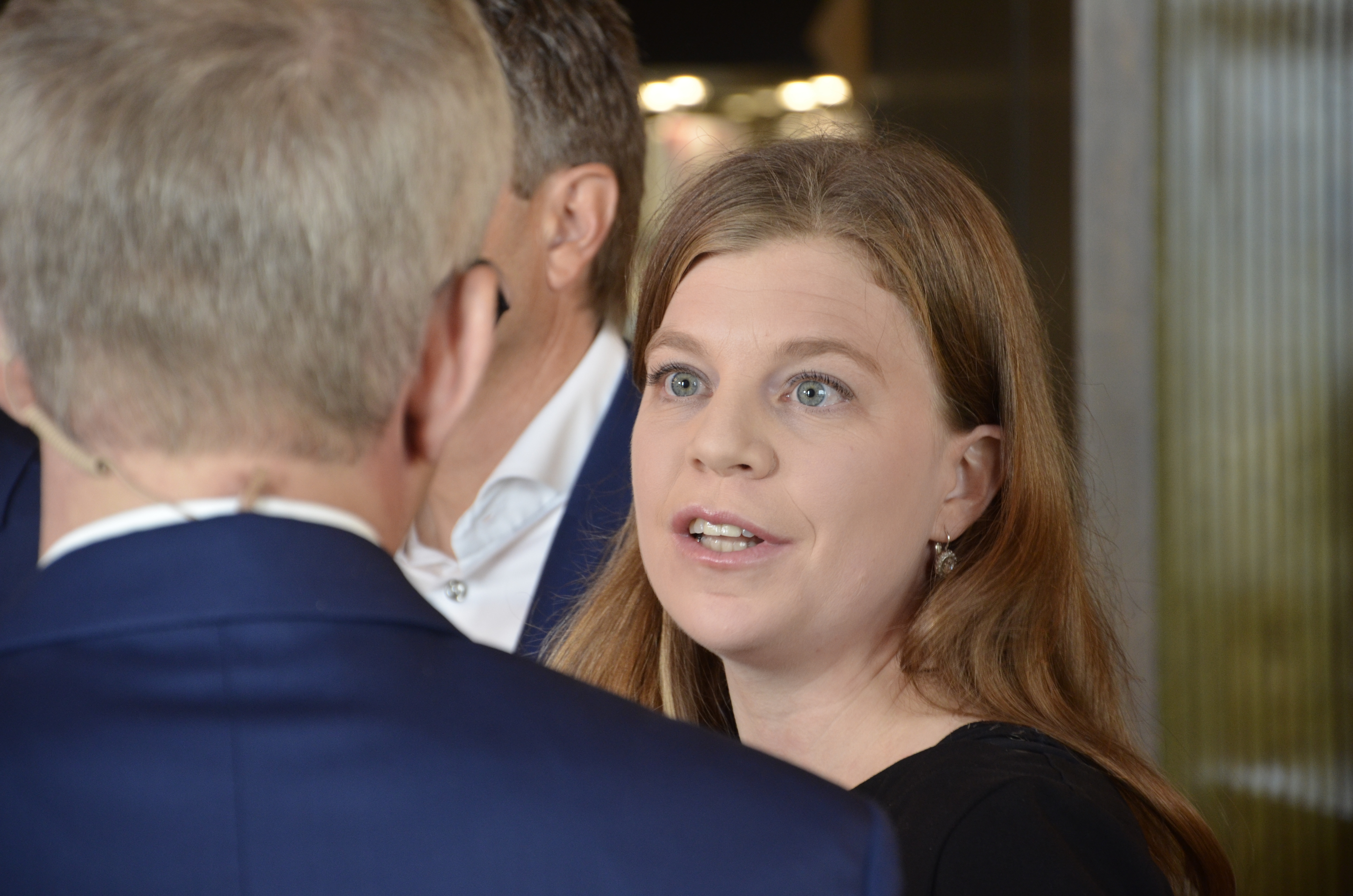 Schweizer Parlamentswahlen 2019: Wahltag im Bundeshaus, Nationalrätin Nadine Masshardt , Wahlkampfleiterin der SP wird interviewt